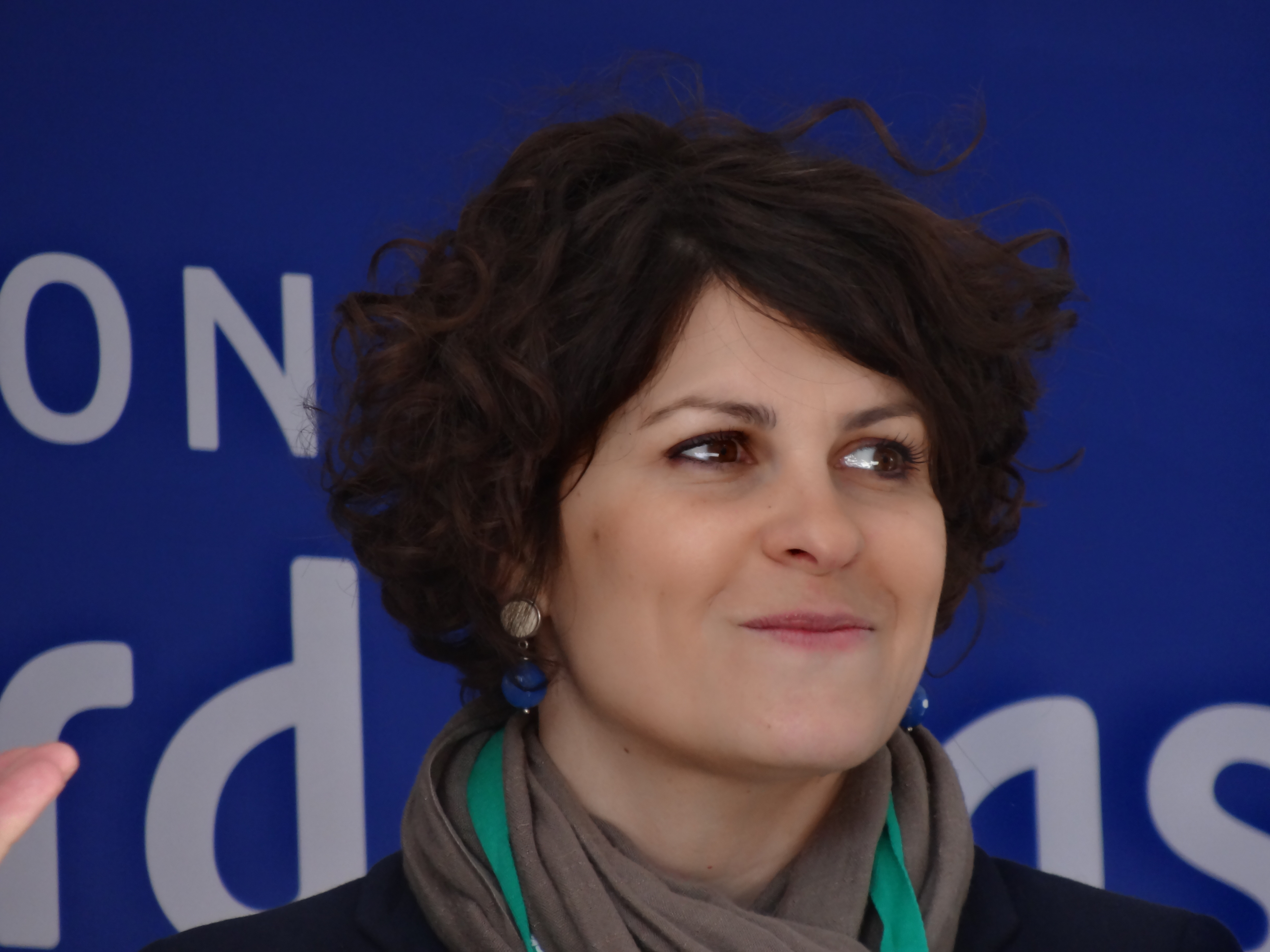 Reportage photographique réalisé le mercredi 1er mai 2013 au départ de la première étape de l'édition 2013 des Quatre jours de Dunkerque à Dunkerque, Nord, Nord-Pas-de-Calais, France. Le dossier photographique montre des véhicules de course exposés, la caravane publicitaire, la présentation des coureurs, et le départ. Ce fichier représente un ou plusieurs coureurs cyclistes que JÄNNICK Jérémy n'est pas parvenu à identifier, ou n'a pas eu le temps de le faire. Si vous le reconnaissez, supprimez Quatre jours de Dunkerque 2013|Cycliste non identifié et remplacez le par Depicted person|1= :Category: | et placez Category: , Quatre jours de Dunkerque 2013 en bas de page. Si vous souhaitez qu'un portrait soit généré à partir de cette image, contactez son auteur qui s'en chargera, afin que ce nouveau fichier soit cohérent avec les autres réalisés. Des notes peuvent être utiles pour identifier précisément chaque personne.